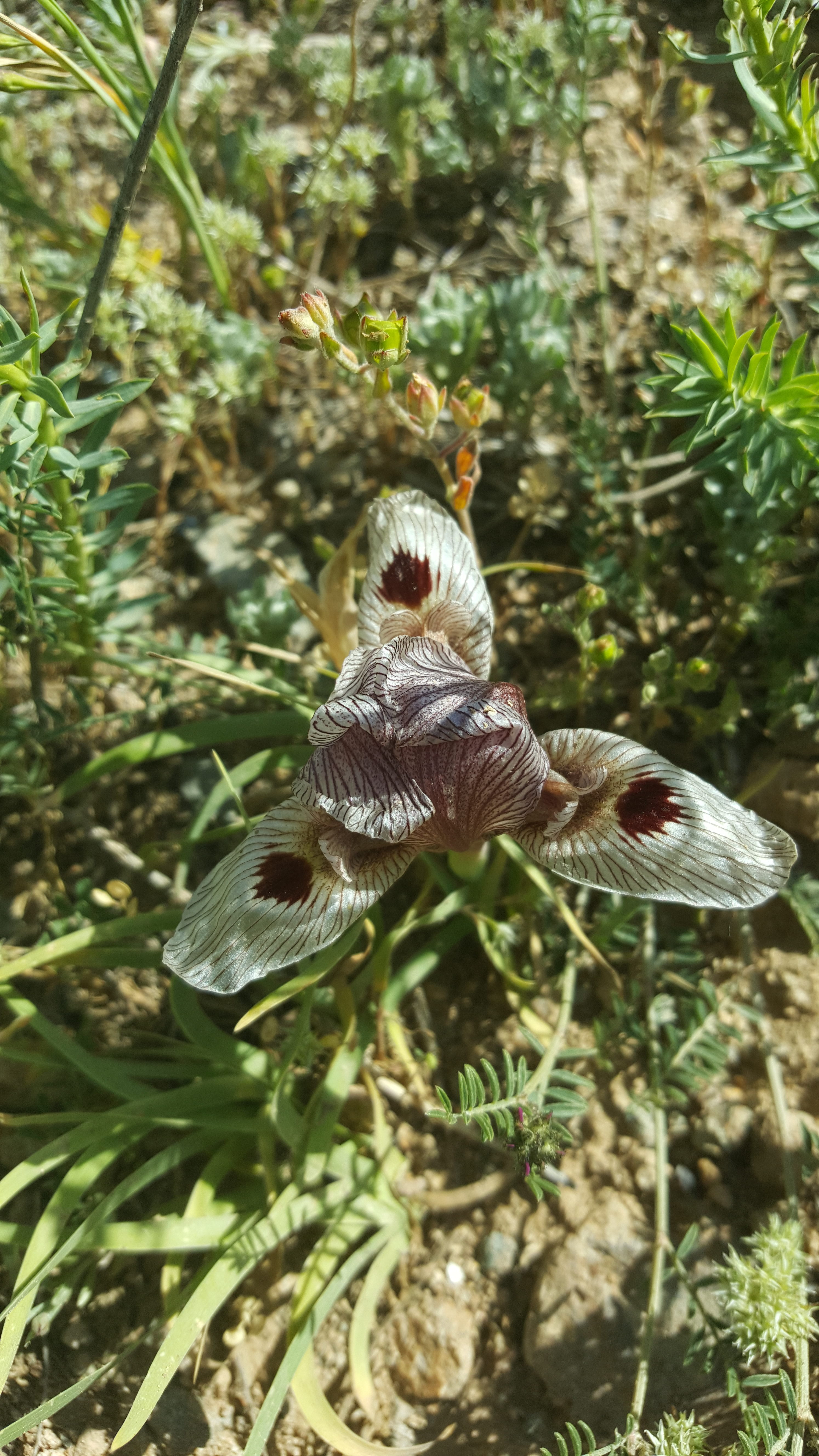 گل نادر زنبق ایرانی